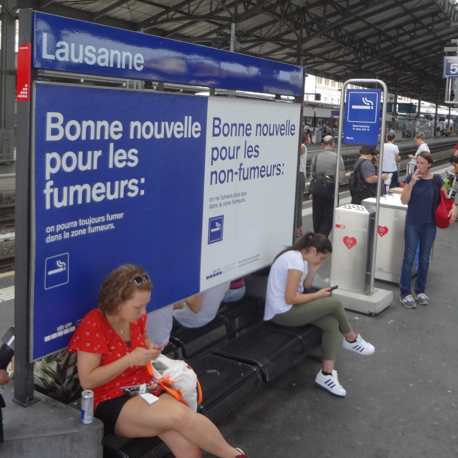 Communication concernant les zones fumeurs en gare de Lausanne. Zone fumeur à l'arrière plan.